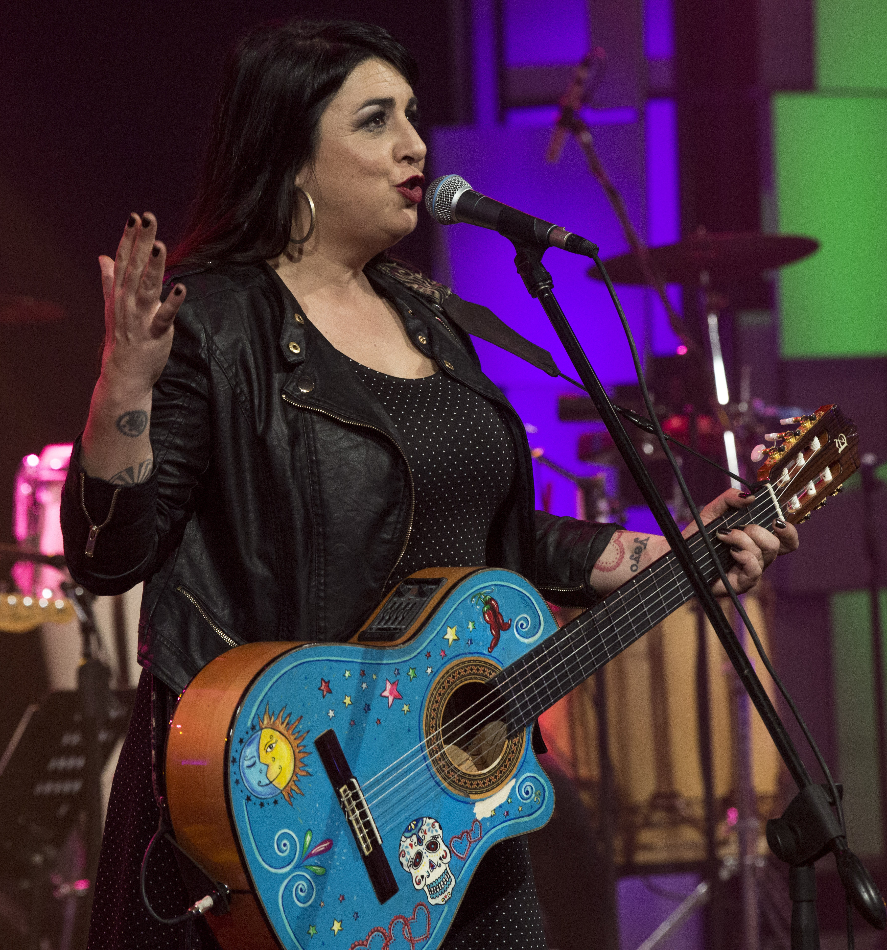 Buenos Aires, 27 de febrero de 2015 - El Ministerio de Cultura de la Nación, la TV Pública y el Plan Nacional Igualdad Cultural —en el que convergen las carteras de Cultura y Planificación Federal— presentan el programa especial “Somos Todas. Mujeres en libertad”, un concierto de música y poesía en homenaje a la mujer, en el marco del Día Internacional por los Derechos de la Mujer y la Paz Internacional. Entre las artistas convocadas, se incluyen Roxana Carabajal, Virginia Inocentti, Carolina Peleritti, Celeste Carballo, Amparo Sánchez, Ana Prada, Luciana Jury, Yusa, Sofía Viola, Miss Bolivia, Las Taradas, Georgina Hassan, Liliana Vitale, Laura Ros, La Yegros, Gimena Álvarez, Naara Andariega, Sara Hebe, Flopa y el dúo Vecina (Marianela Cuzzani y Laura Ledesma), que estarán acompañadas por una banda estable, dirigida por Luna Sujatovich, con Pampi Torre y Loli Molina en guitarras, Aldana Aguirre en bajo, Andrea Álvarez en batería, Vivi Pozzebón y Conce Soares en percusión, Gimena Álvarez en acordeón y teclados, e Irene Cadaio en violín. Además, Vera Spinetta, Estela de Carlotto, Graciela Borges, Paola Krum, Alejandra Flechner, Alejandra Darín, Emme y Dolores Fonzi recitarán poemas. Foto: Augusto Starita / Ministerio de Cultura de la Nación.